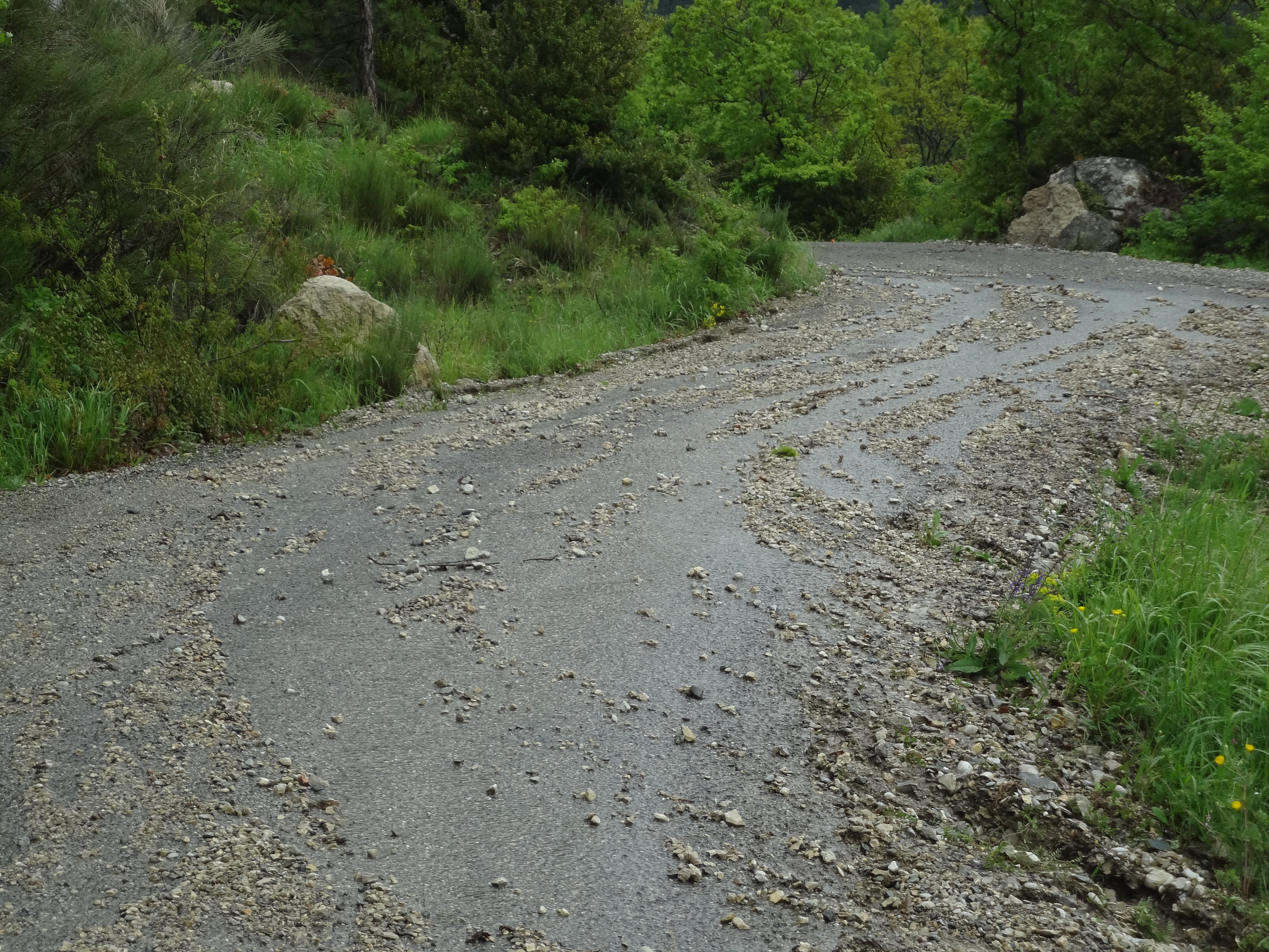 Proche de Mézien